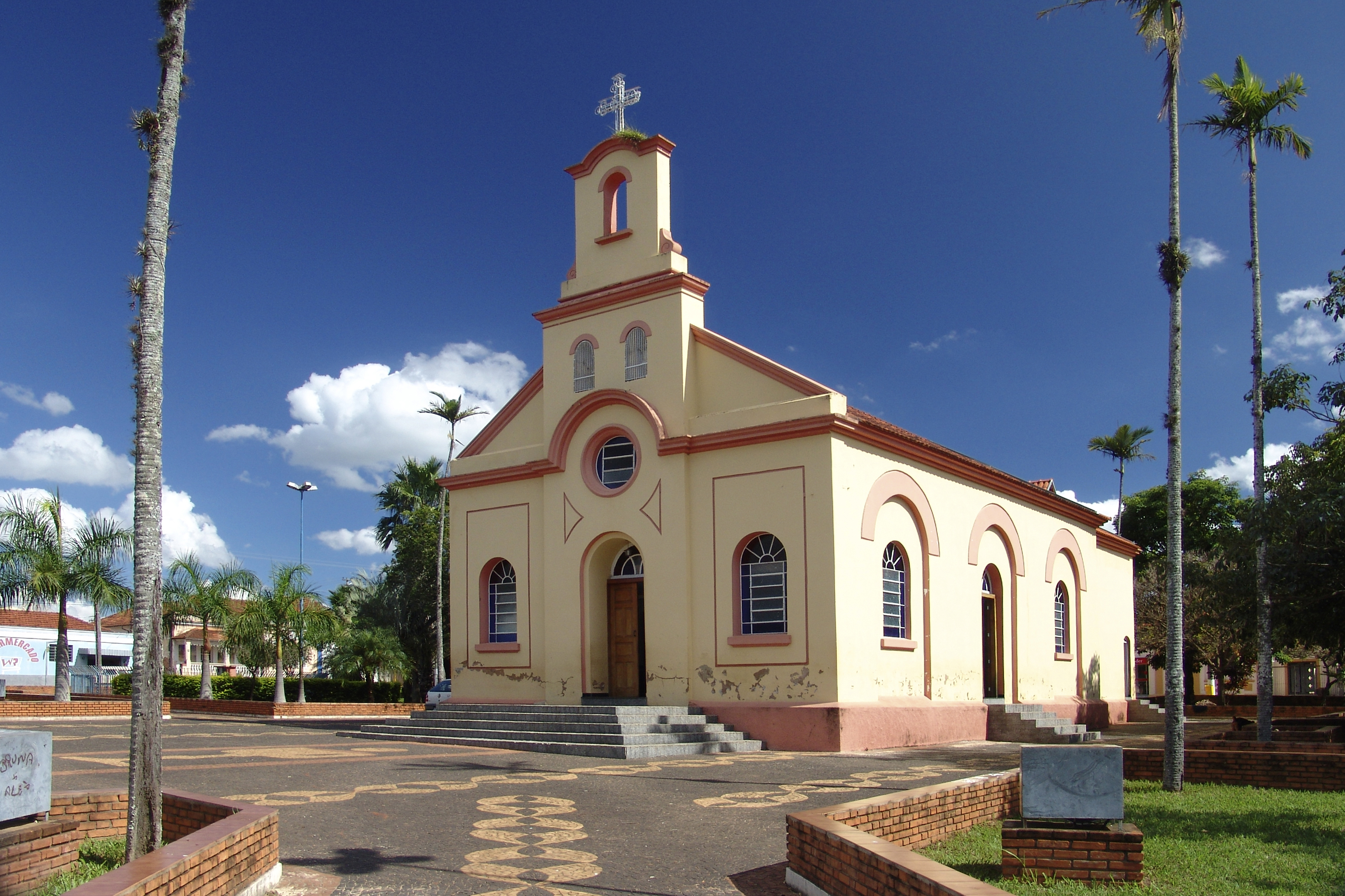 Igreja matriz de Borebi, município de São Paulo, Brasil